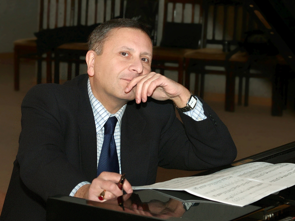 կոմպոզիտոր Վարդան Աճեմյան